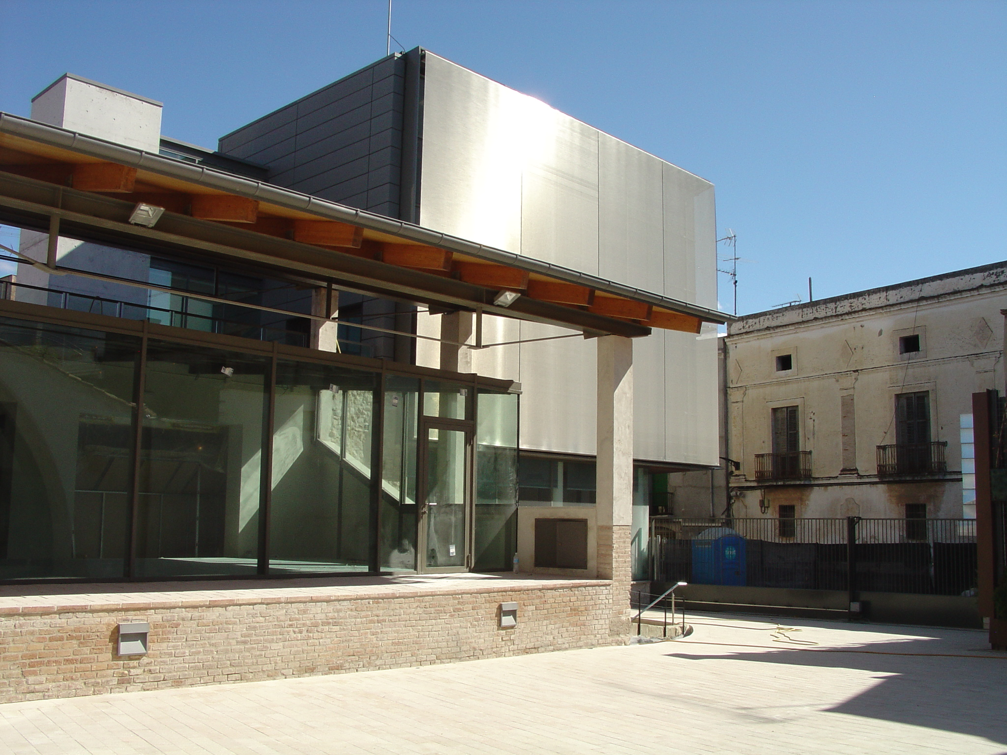 En primer terme i elevat respete al pati es presenta el moll on es descarregava el raïm per ser prensat. En segon terme s'observa el nou annex dell Patronat de Turísme.